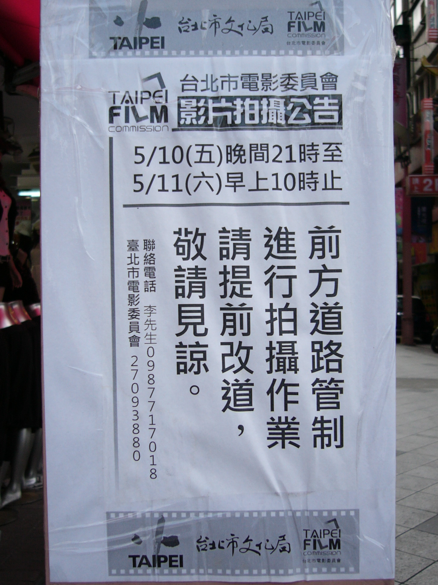 台北市電影委員會張貼於台北市萬華區中華路一段的影片拍攝公告，拍攝時間為2011年5月10日21時整至2011年5月11日10時整。